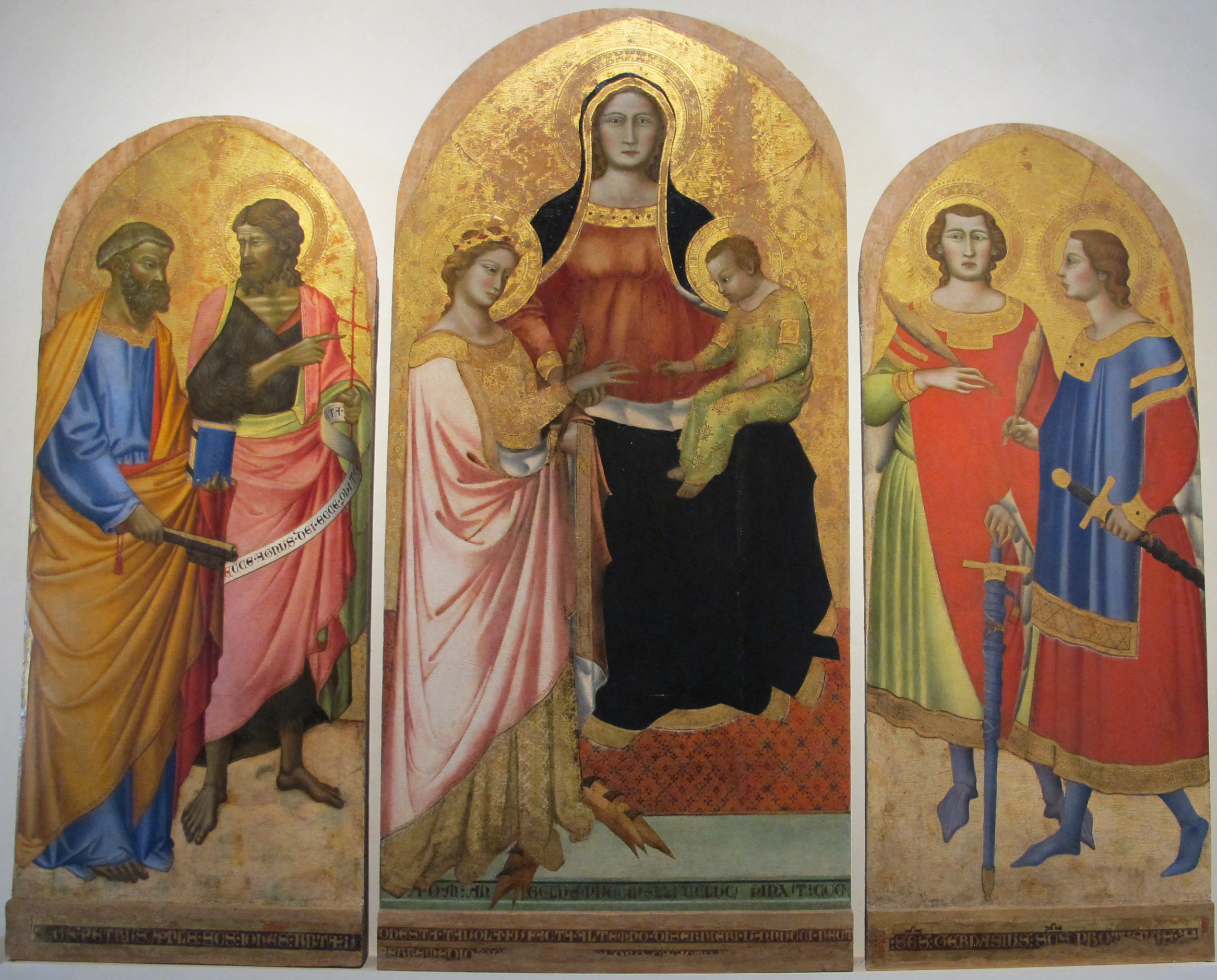 Museo nazionale di Villa Guinigi - MIBAC This is a photo of a monument which is part of cultural heritage of Italy.